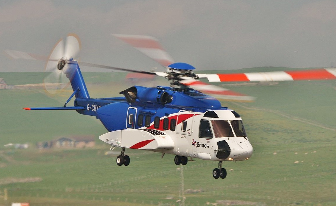 Departing Sumburgh